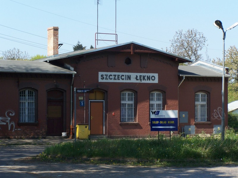 Stacja kolejowa Szczecin Łękno.